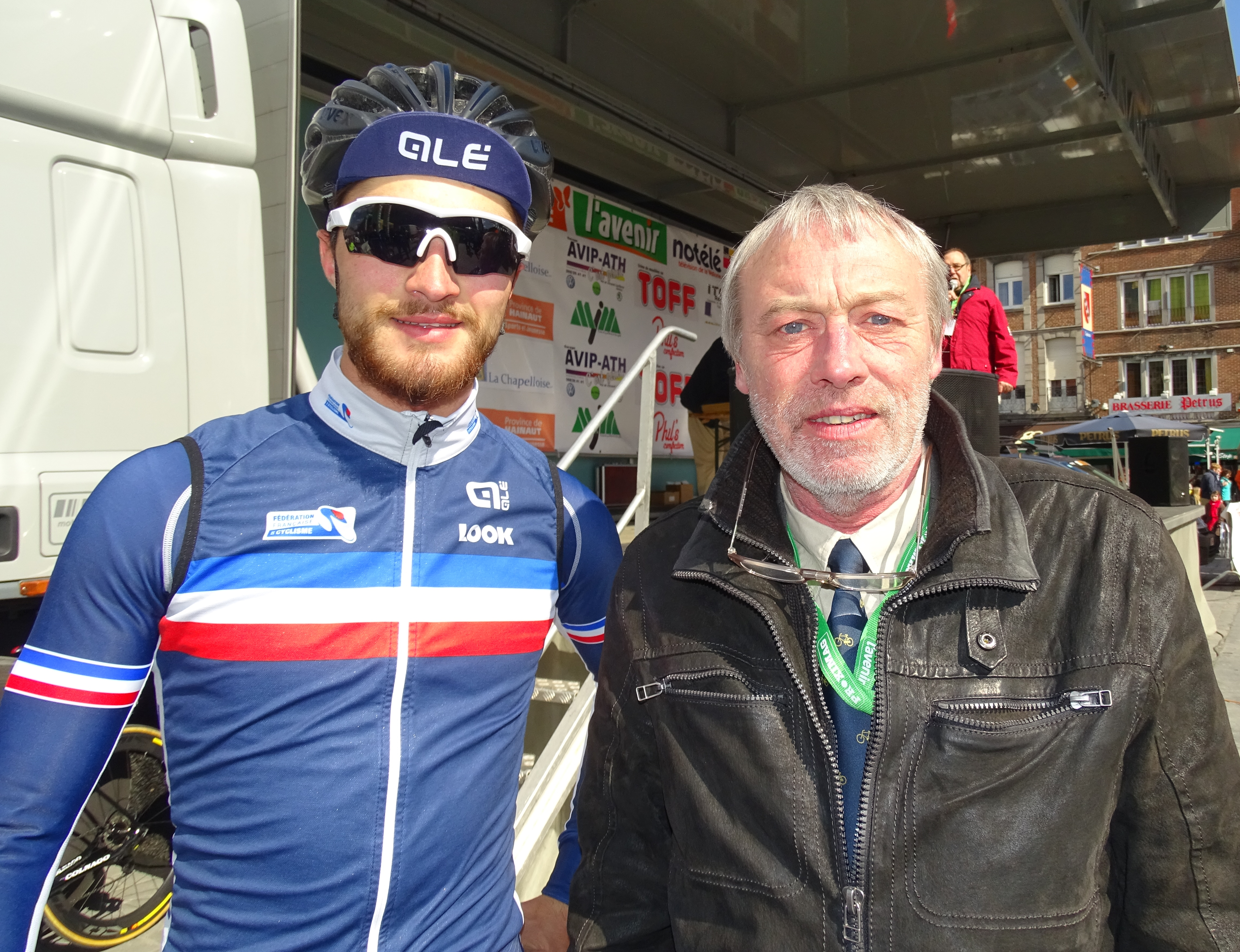 Triptyque des Monts et Châteaux 2015 Depicted people: Marc Fournier and Jean-Pierre Delitte Depicted team: Équipe nationale de France espoirs